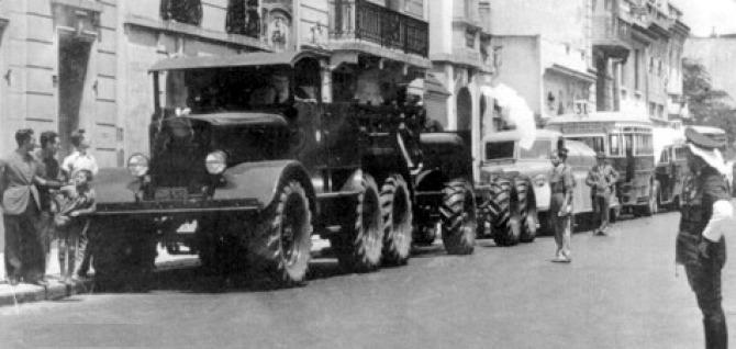 Camión Hispano-Argentina Criollo 6×6